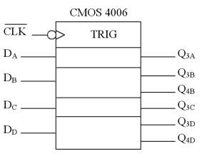 Brochage registre à décallage CMOS 4006